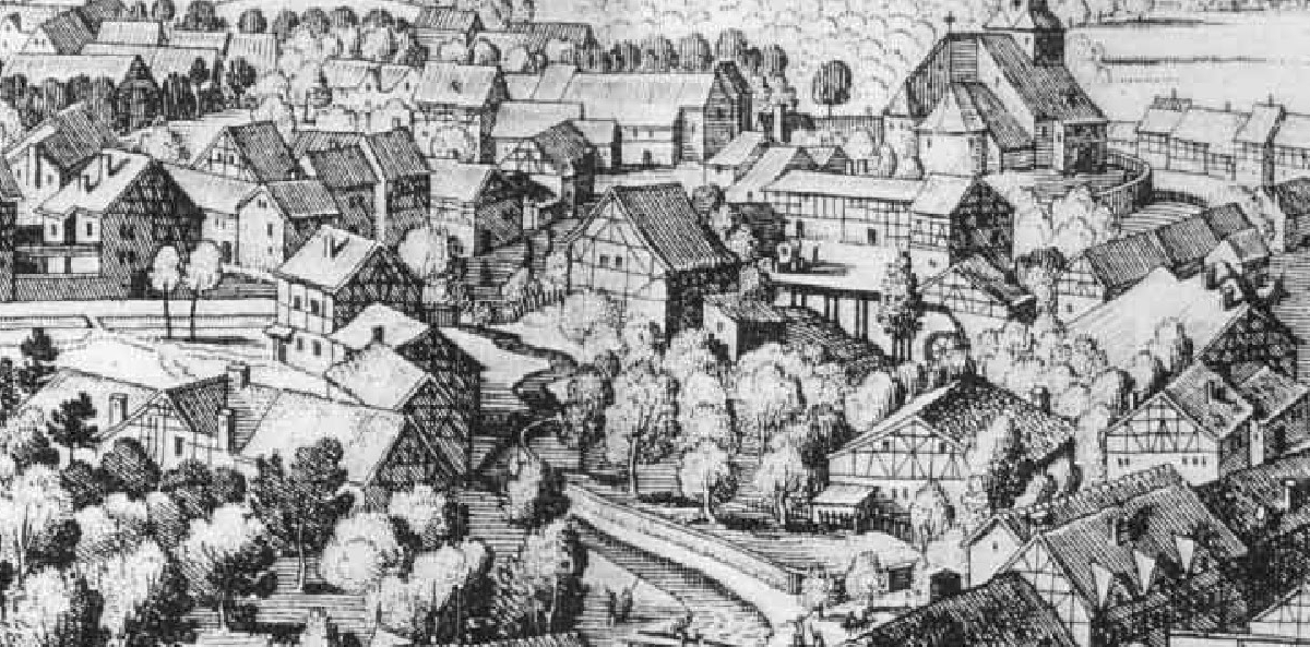 Vue de Spa, 1764, gravure, Matthäus Merian